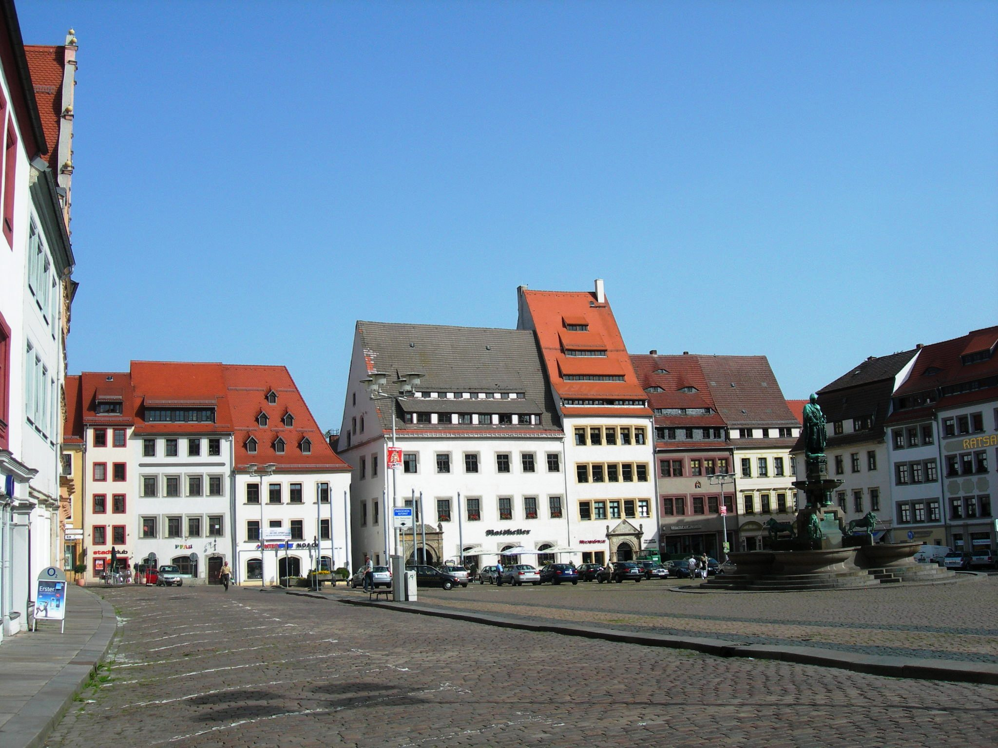 Freiberg, Obermarkt, northern side.